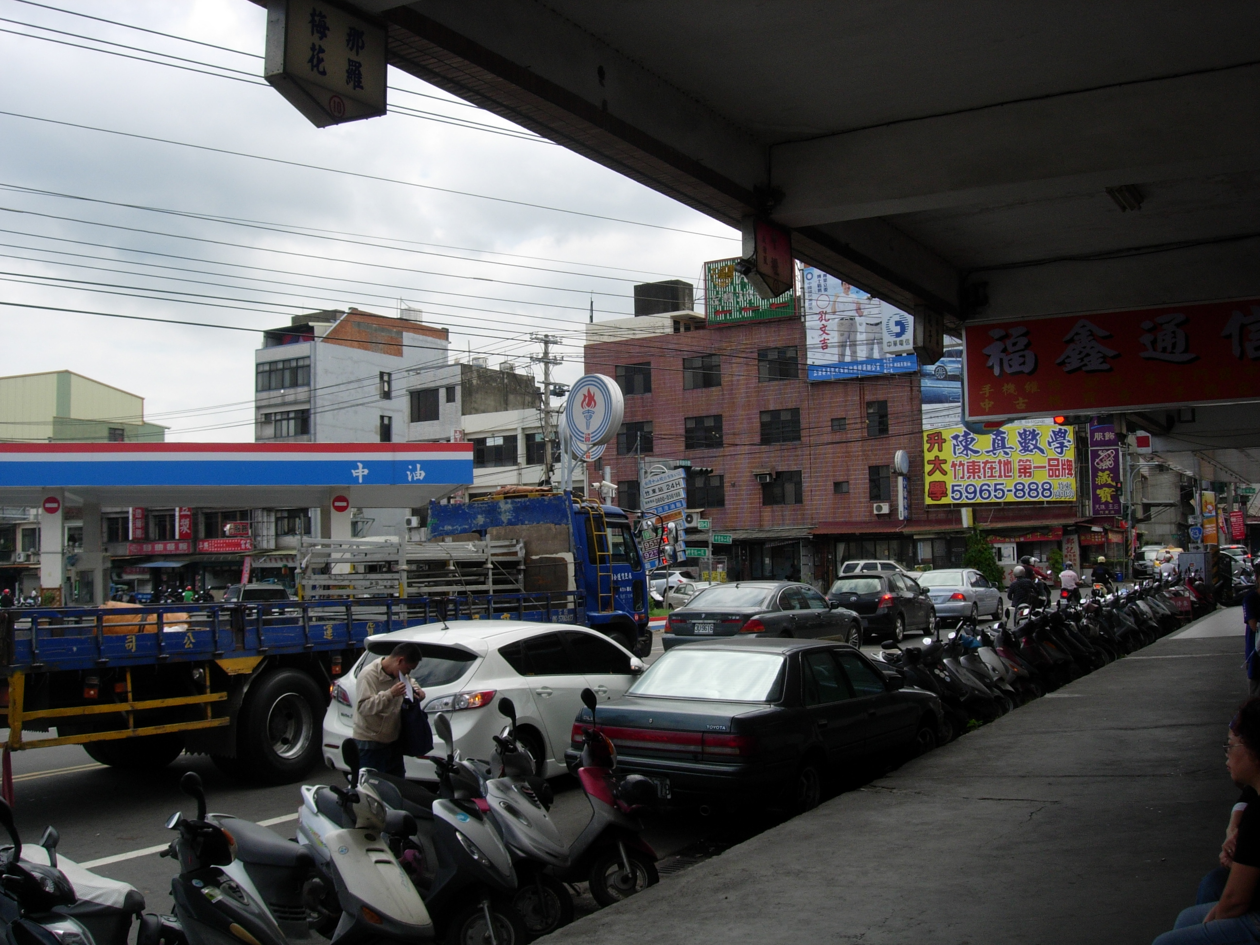 中文（台灣）: 新竹客運下公館站月台2